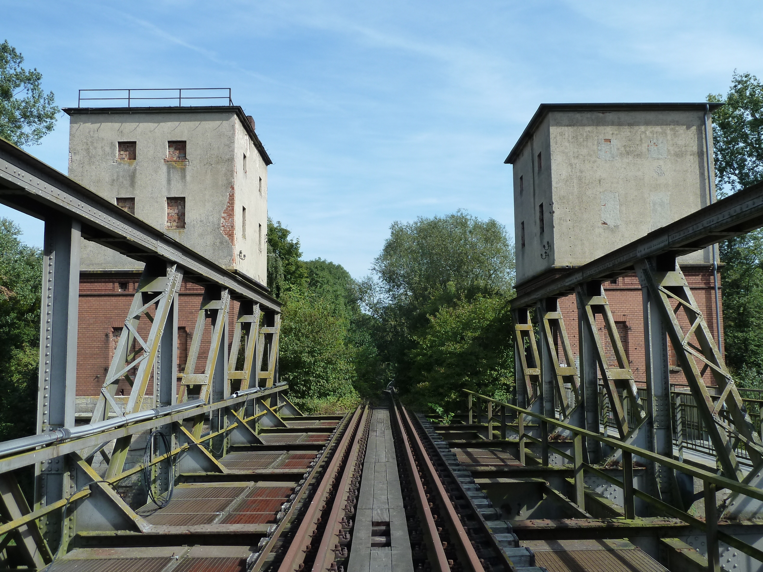 Elbebrücke Barby, Ostkopf